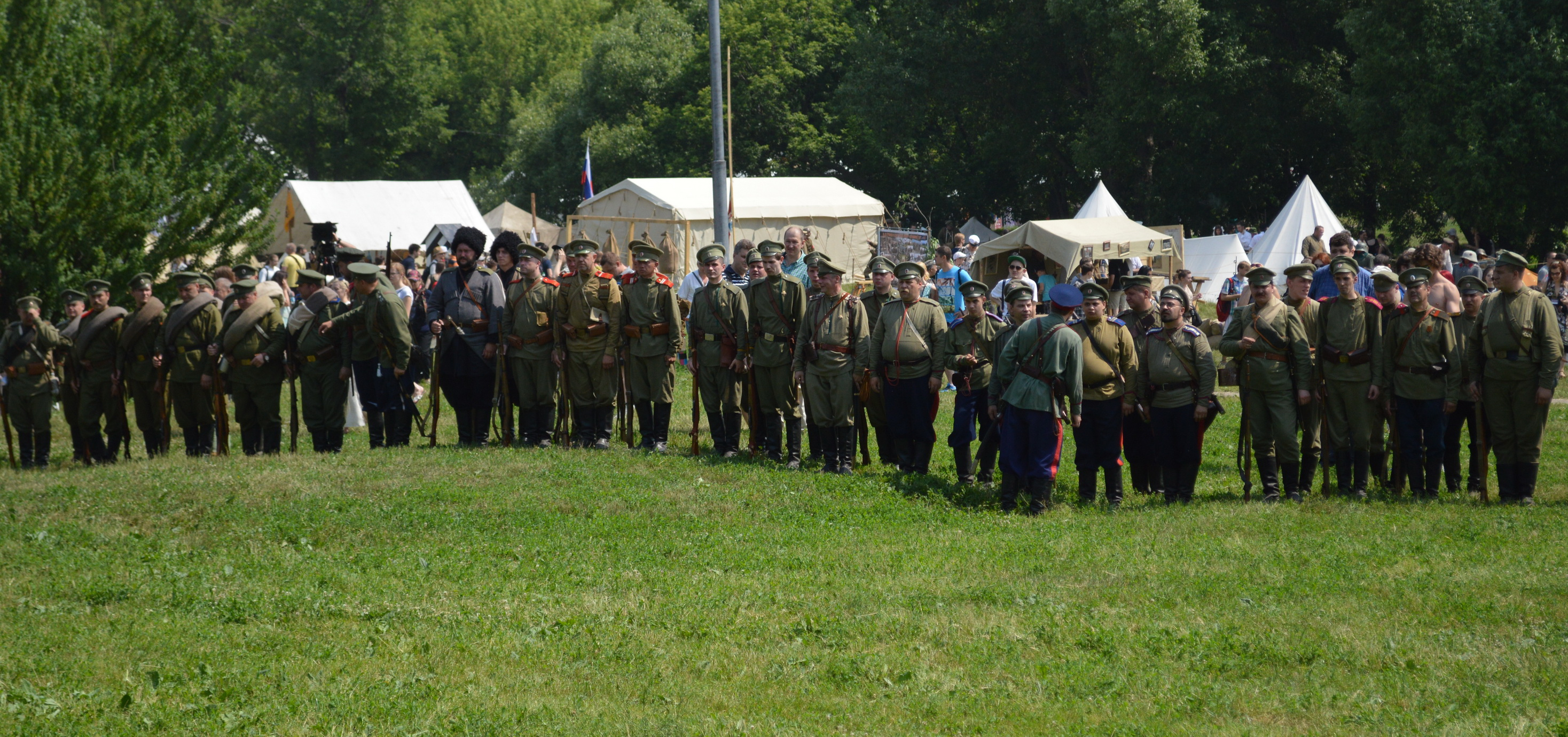 Фестиваль исторической реконструкции "Времена и эпохи" в Коломенском.